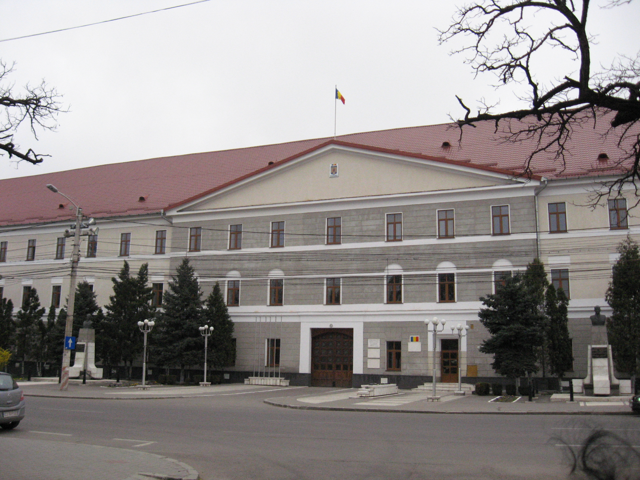 Cluj-Napoca, Piaţa Ştefan cel Mare